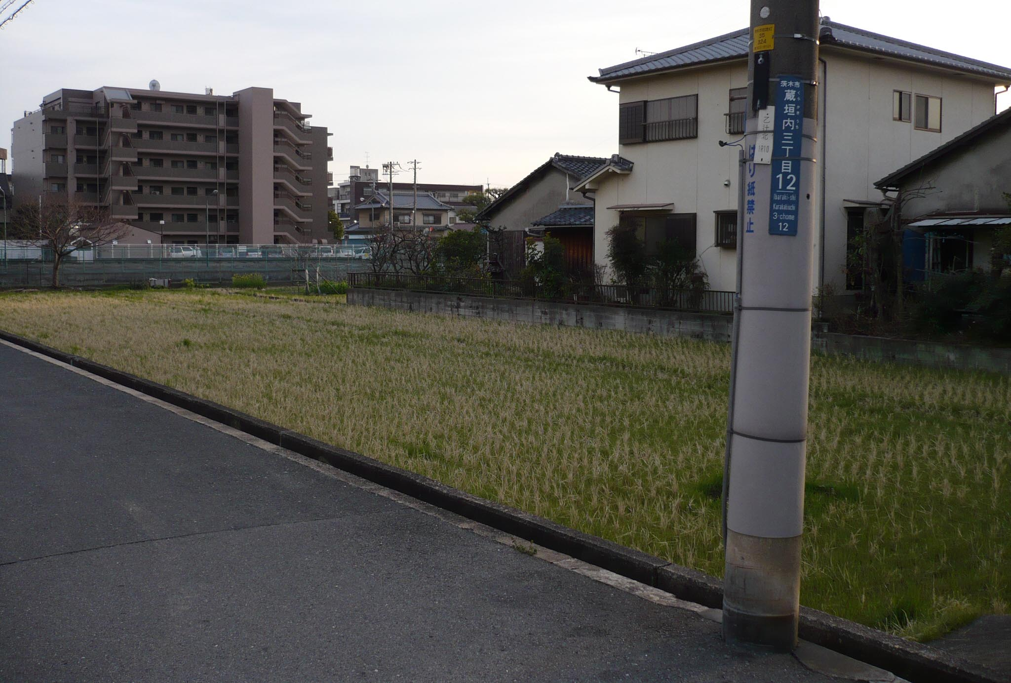 三宅城の推定城内を撮影